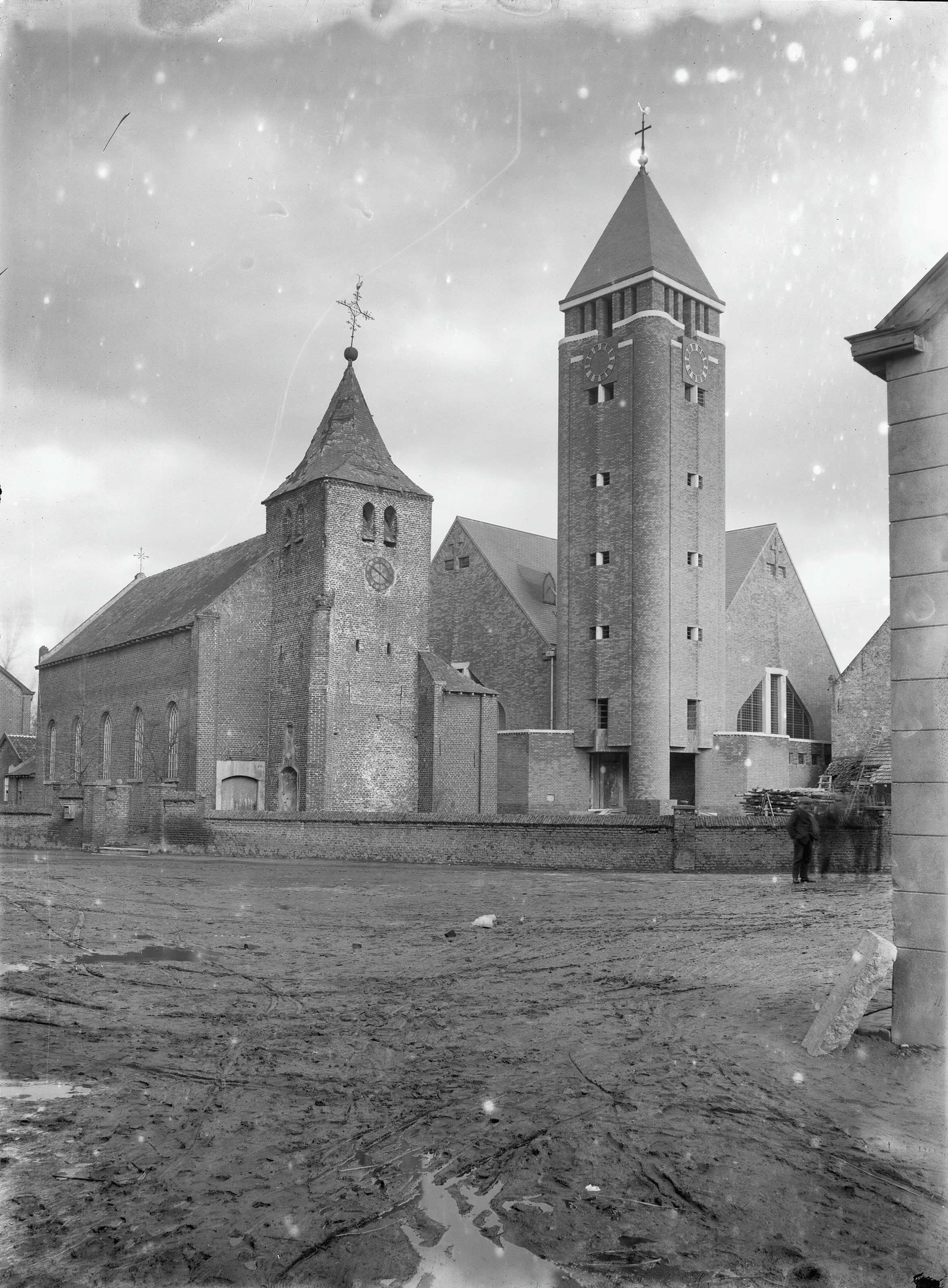 Rooms-Katholieke Kerk: exterieur naar het noord-oosten - Barbarakerk links de oude kerk uit de 16e eeuw - afgebroken in 1925 - rechts de nieuwe Barbarakerk uit 1925 - deze kerk werd in november 1944 door oorlogsgeweld vernield.